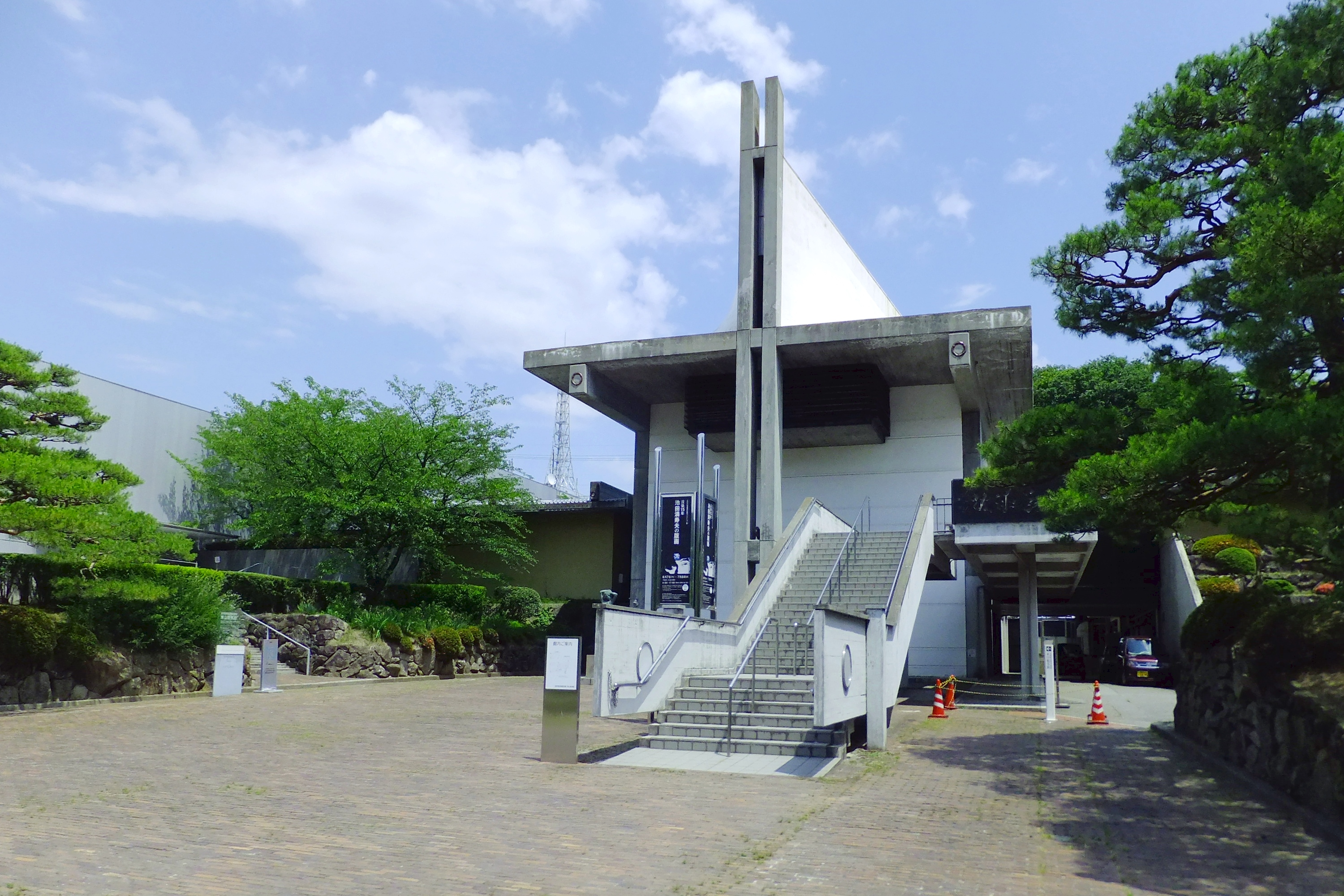 長野県信濃美術館本館、左隣に東山魁夷館がある。